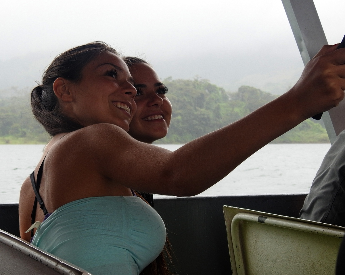 DSCN6055-new Costa Rica 2016